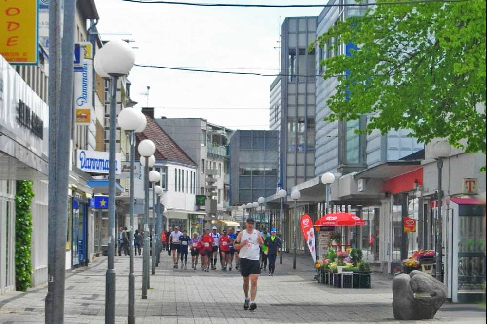 Gorch-Fock-Marathon 2010 in der Fußgängerzone